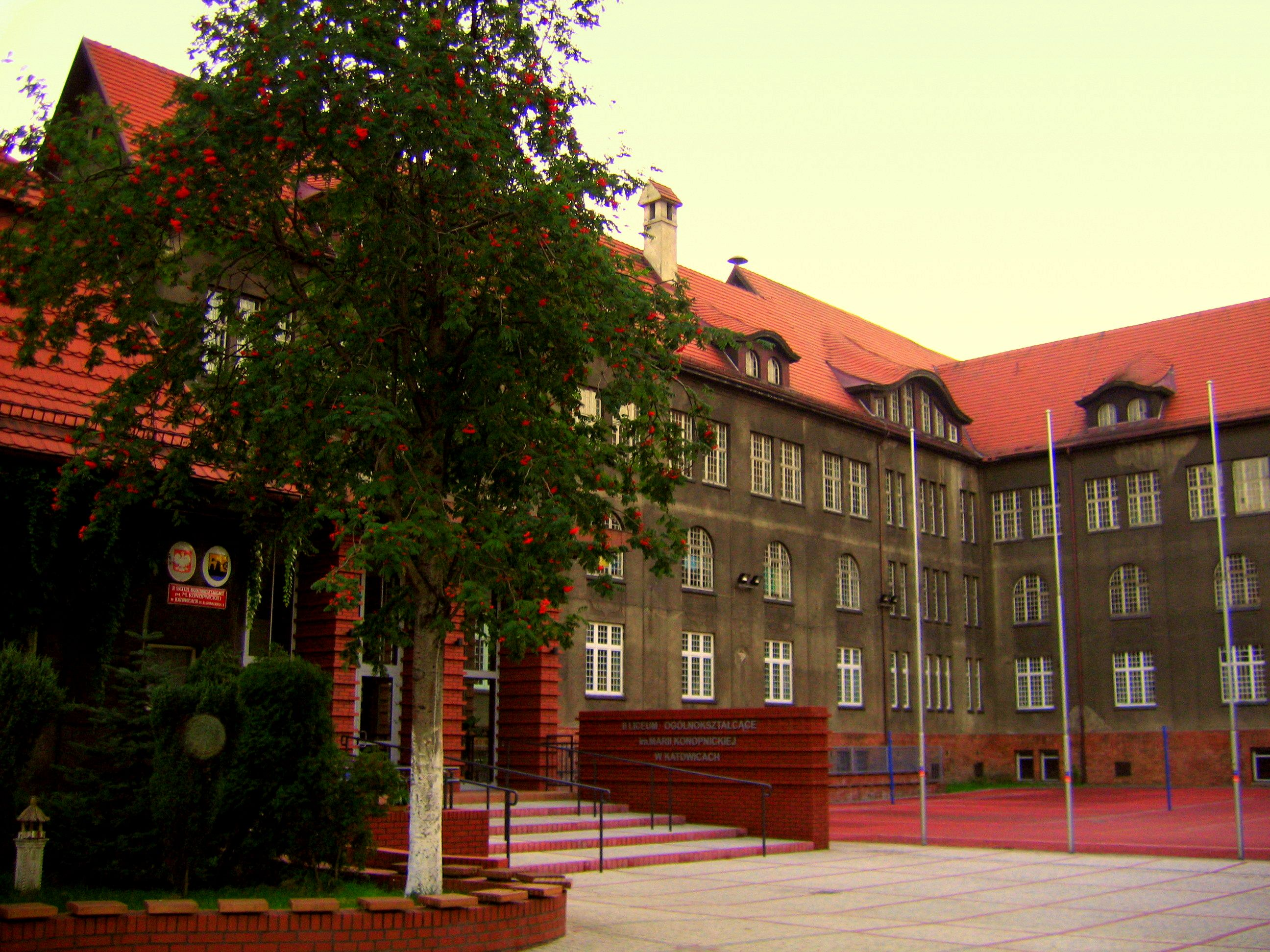 II Liceum Ogólnokształcące im. Marii Konopnickiej w Katowicach